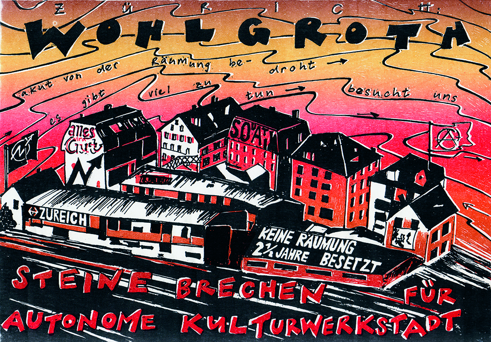 Übersicht über die besetzte Wohlgroth in Zürich vor der Räumung, November 1993